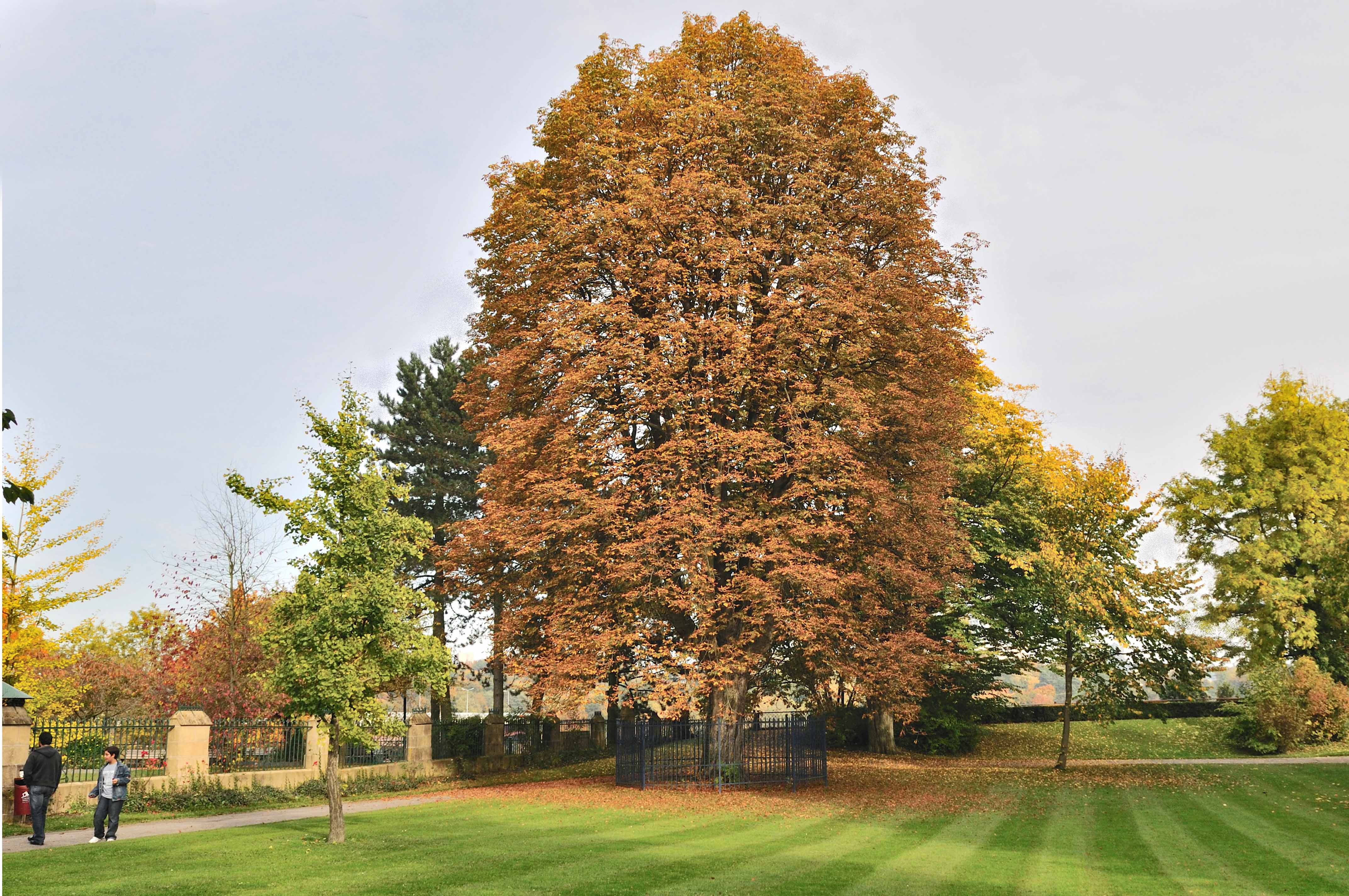 Bam vum Prënz Jean am Pescatore-Park zu Lëtzebuerg.